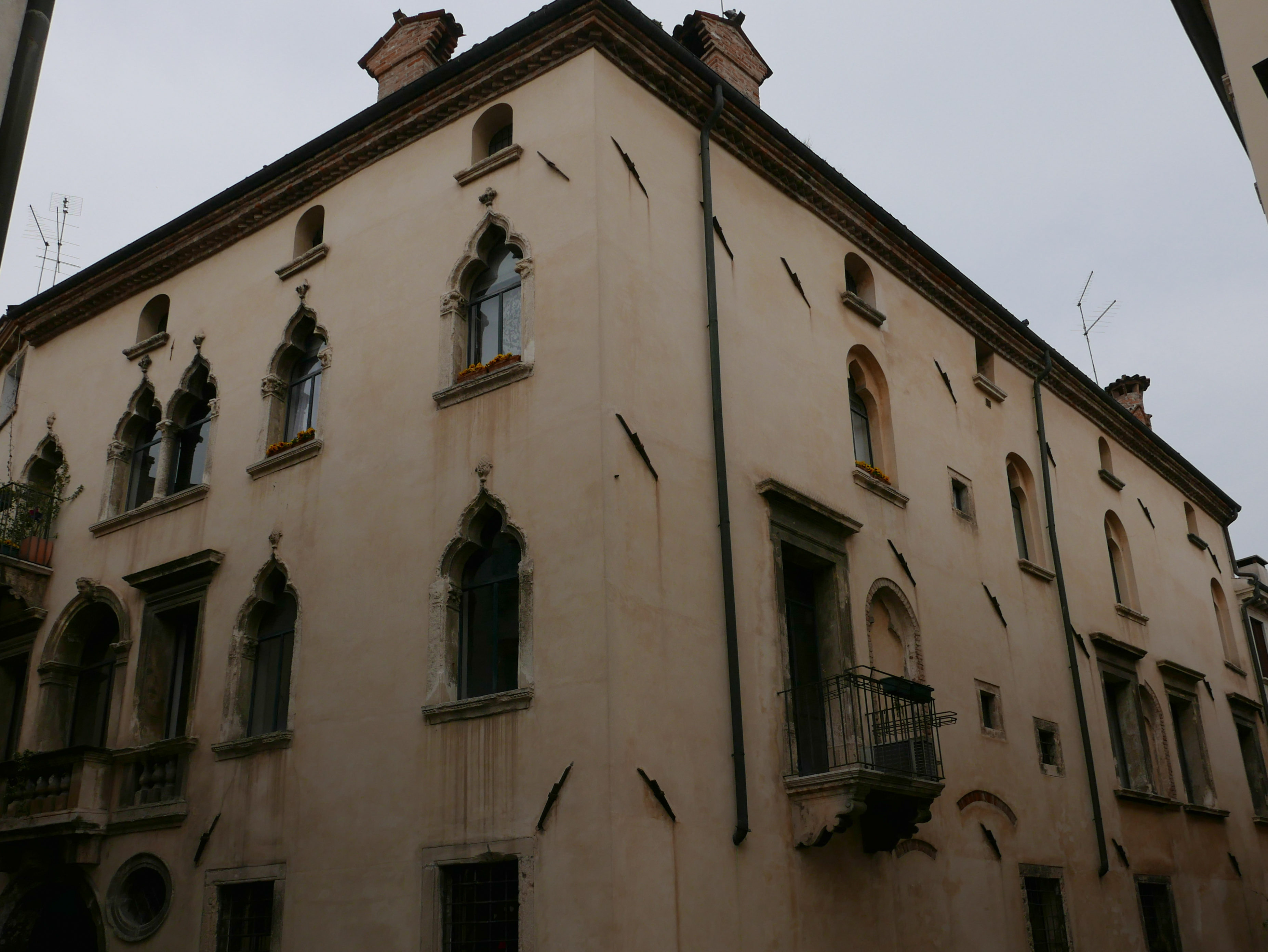 Dettaglio della facciata